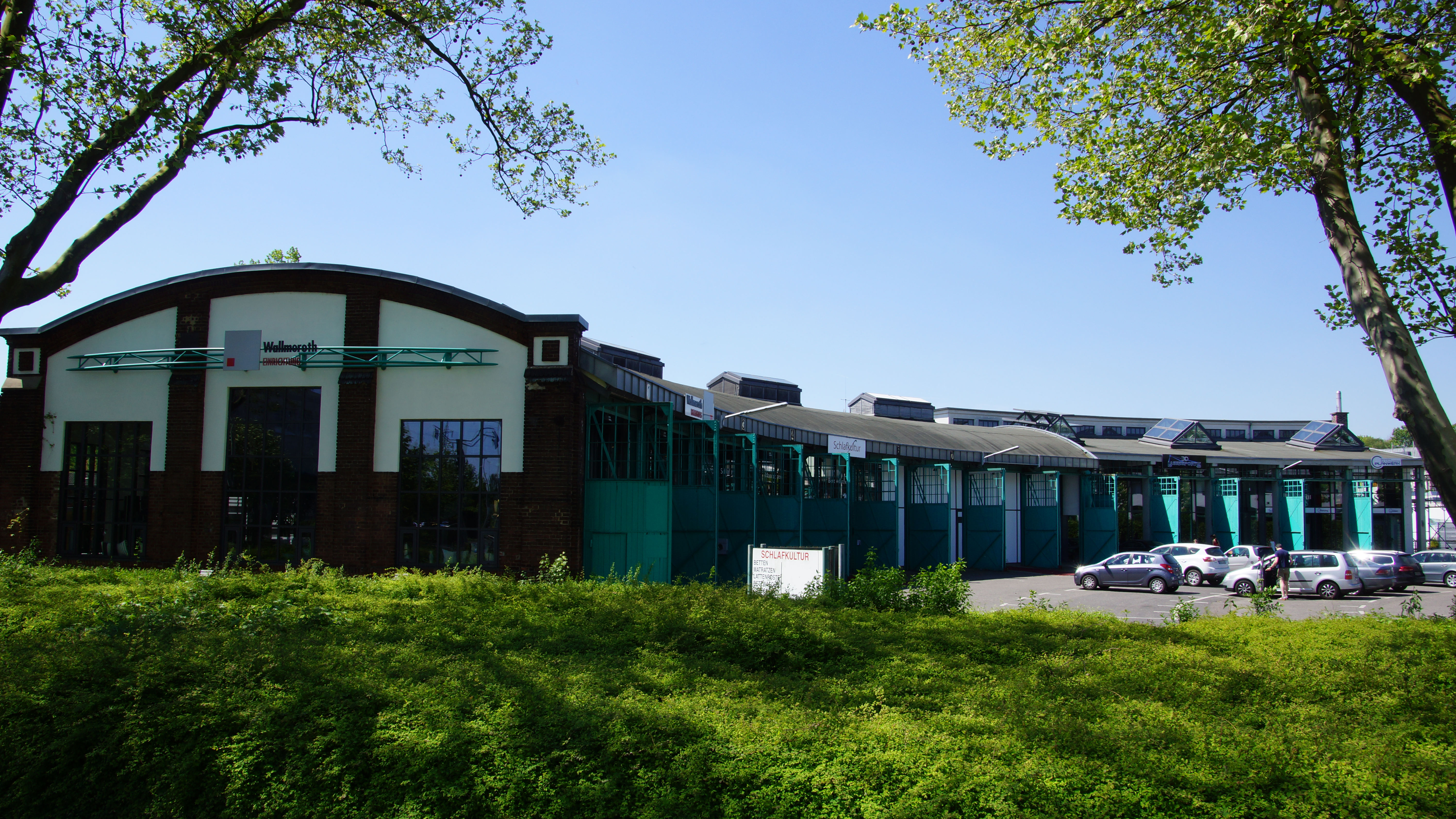 Baudenkmal Ringlokschuppen in Frechen, Flur 24, Parzelle Nr. 1995 This is a photograph of an architectural monument. 103